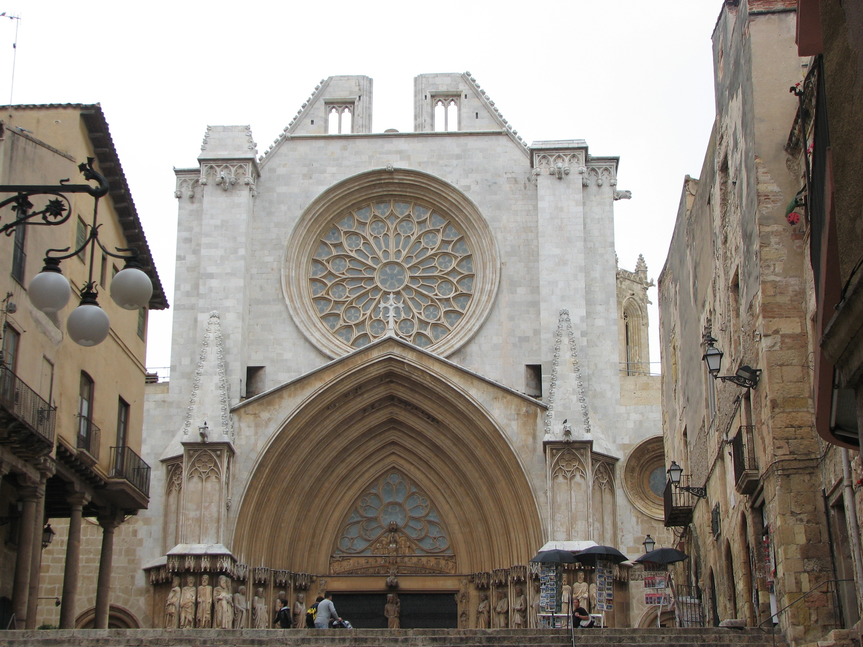 Tarragona katedraal